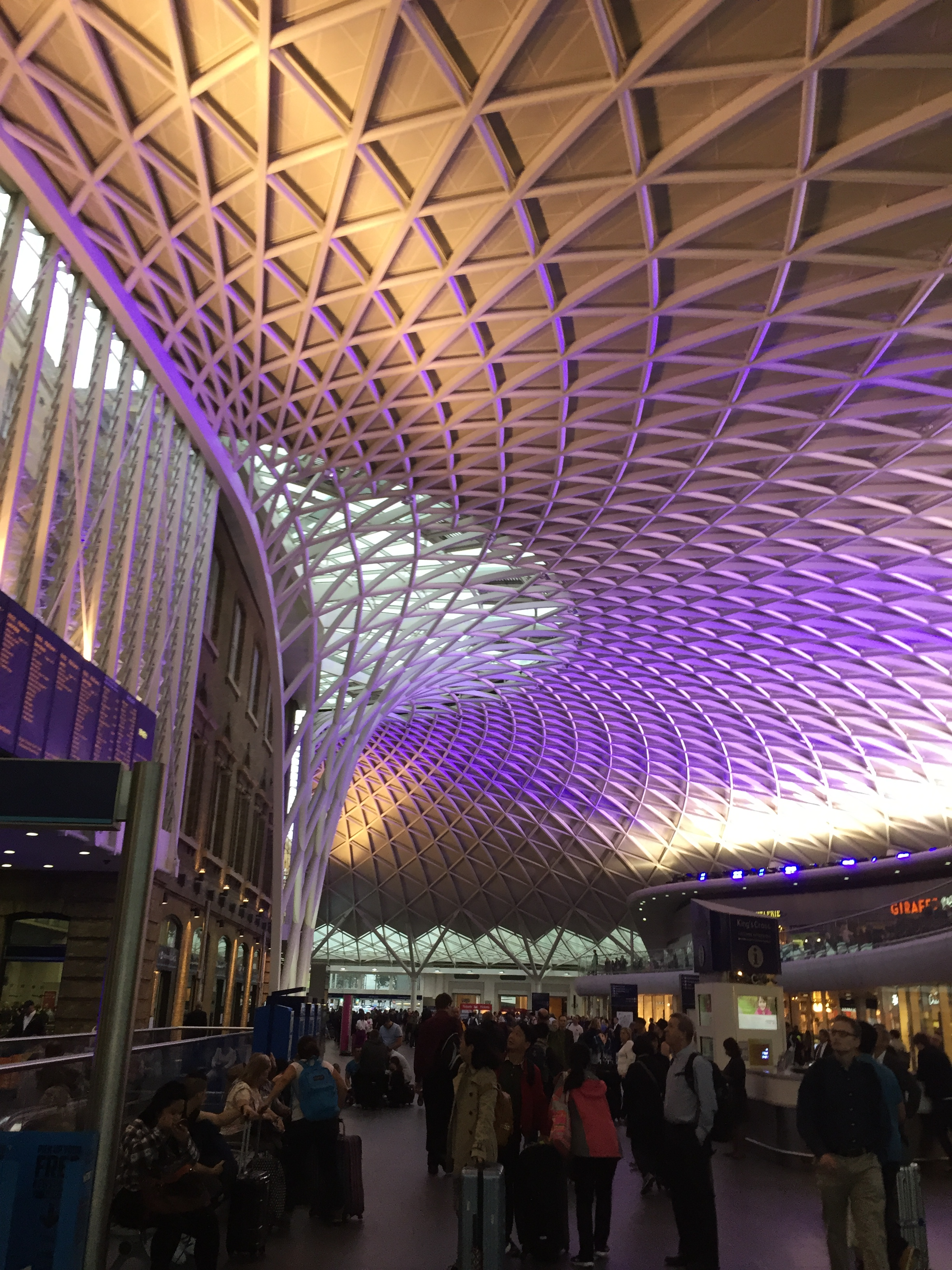 Kings Kroso stoties nauja dalis